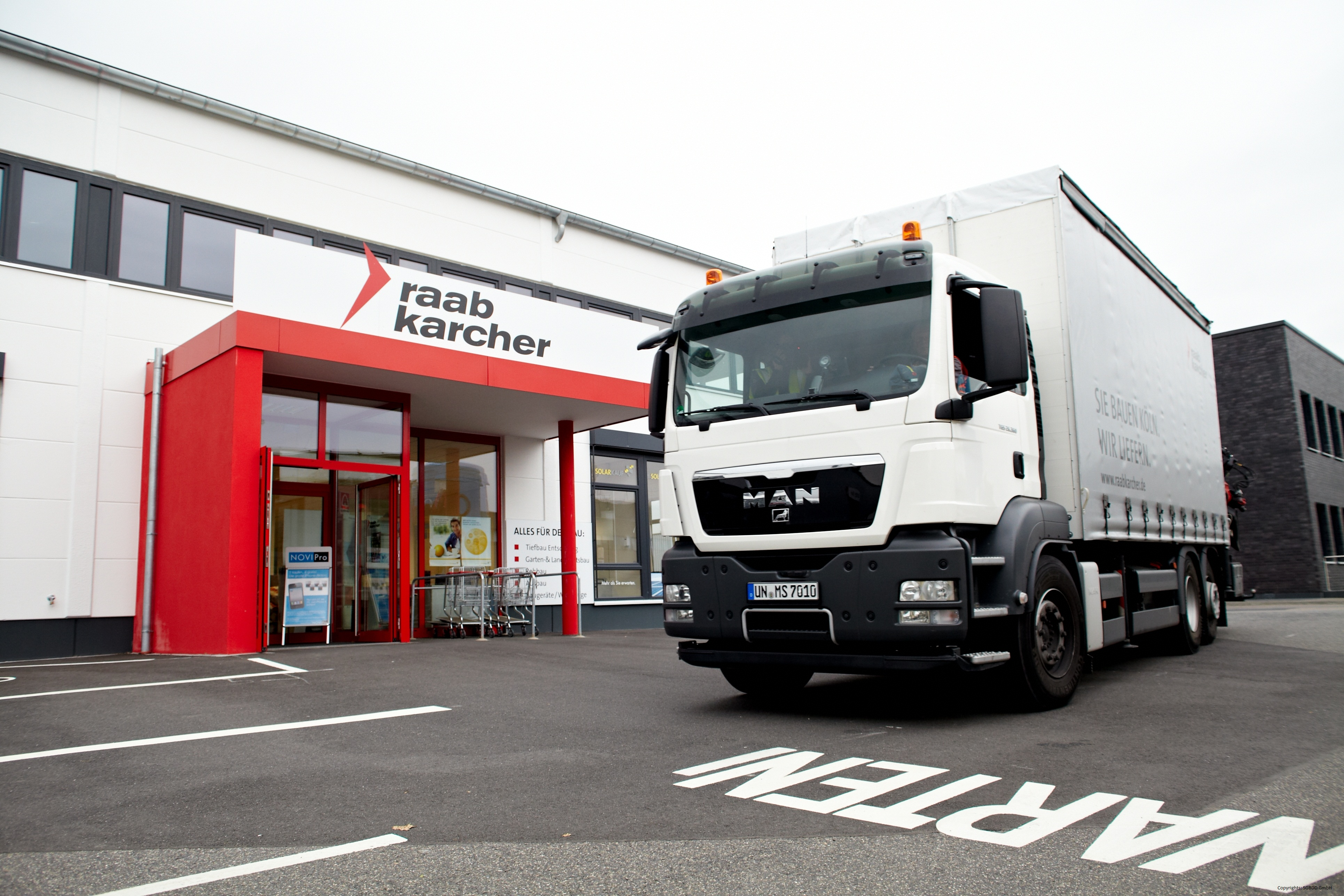 Eine der 117 Raab Karcher Niederlassungen bundesweit